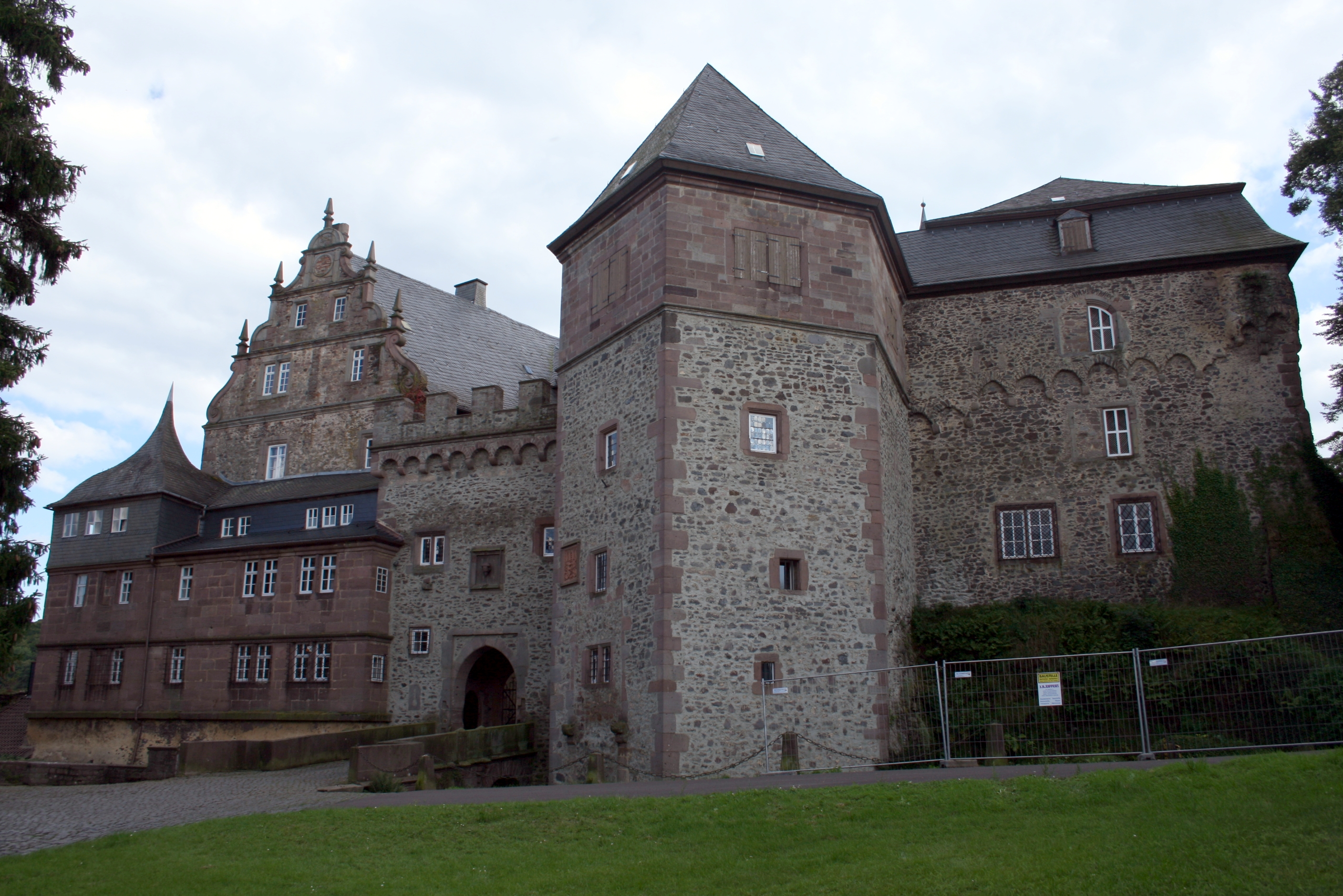 Schloss Eisenbach bei Lauterbach im mittelhessischen Vogelsberg: Blick auf die Kernburg mit fünfeckigem Bergfried